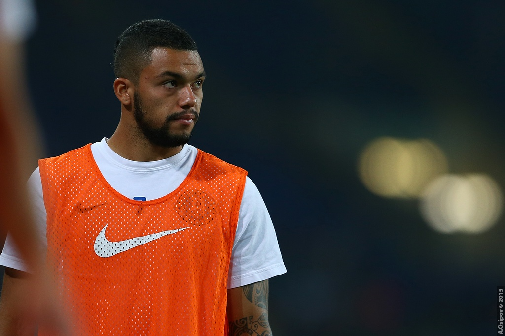 27.09.2015 г.Харьков. Стадион "Металлист". 9-й тур Лиги Пари-Матч Металлист - Днепр - 1:2 John Jairo Ruiz